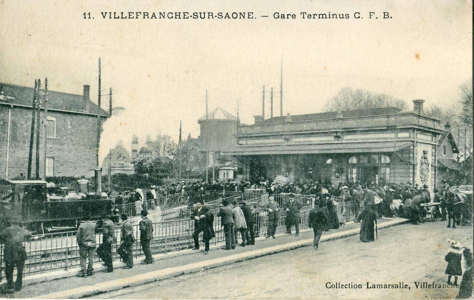 Carte postale ancienne éditée par Lamarsalle à Villefranche, n°11 : Villefranche-sur-SaôneVILLEFRANCHE-SUR-SAÔNE - Gare terminus C. F. B.